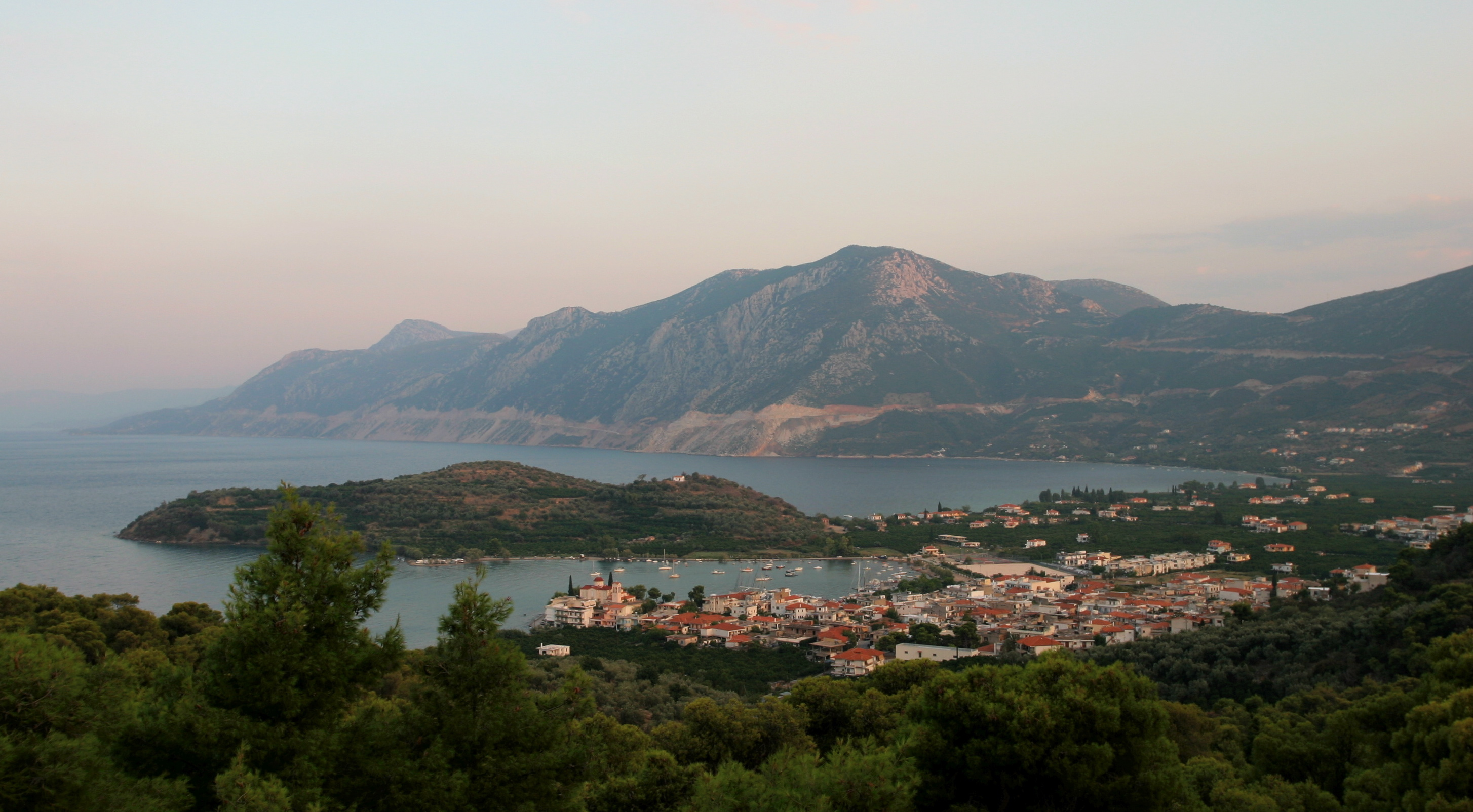 Palea Epidavros: Sicht auf die Halbinsel, auf der sich die antike Stadt befand. (Oktober 2006)